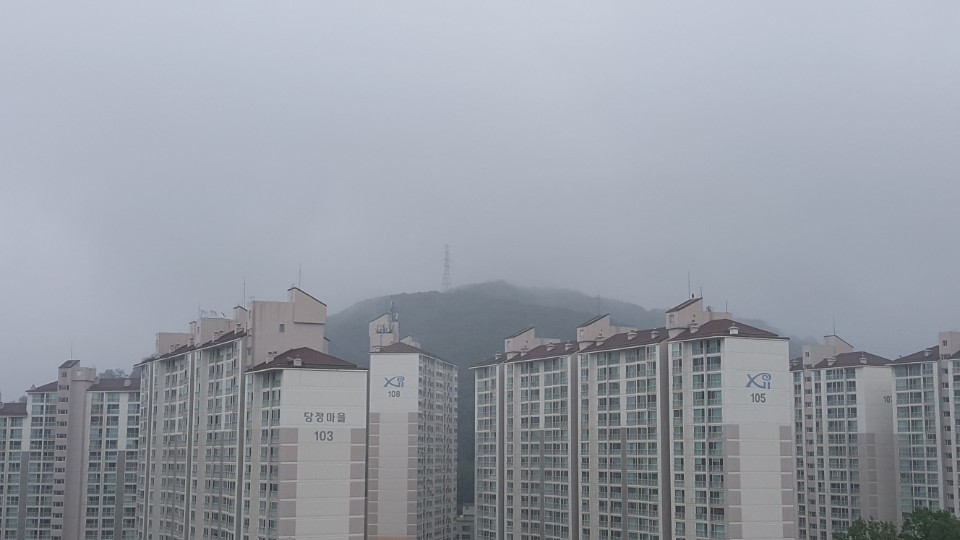 아파트 뒤에 위치한 오봉사